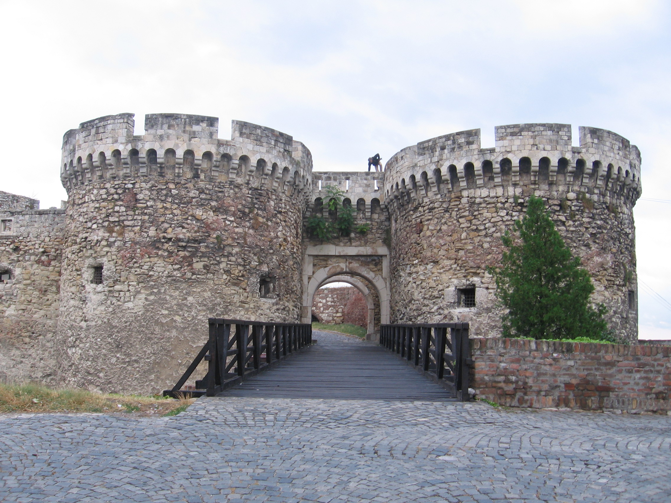 Калемегдан